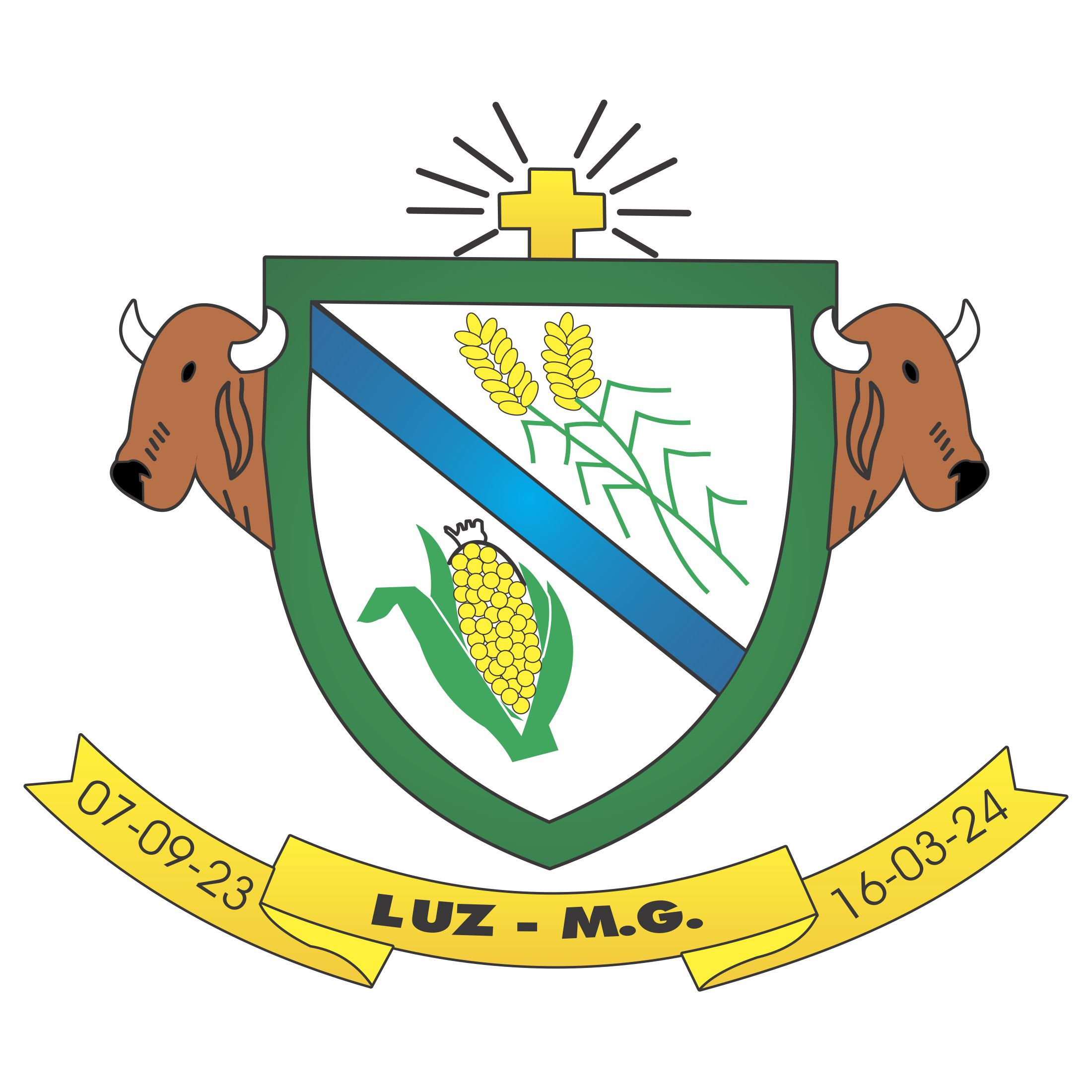 Brasão - Município de Luz - MG